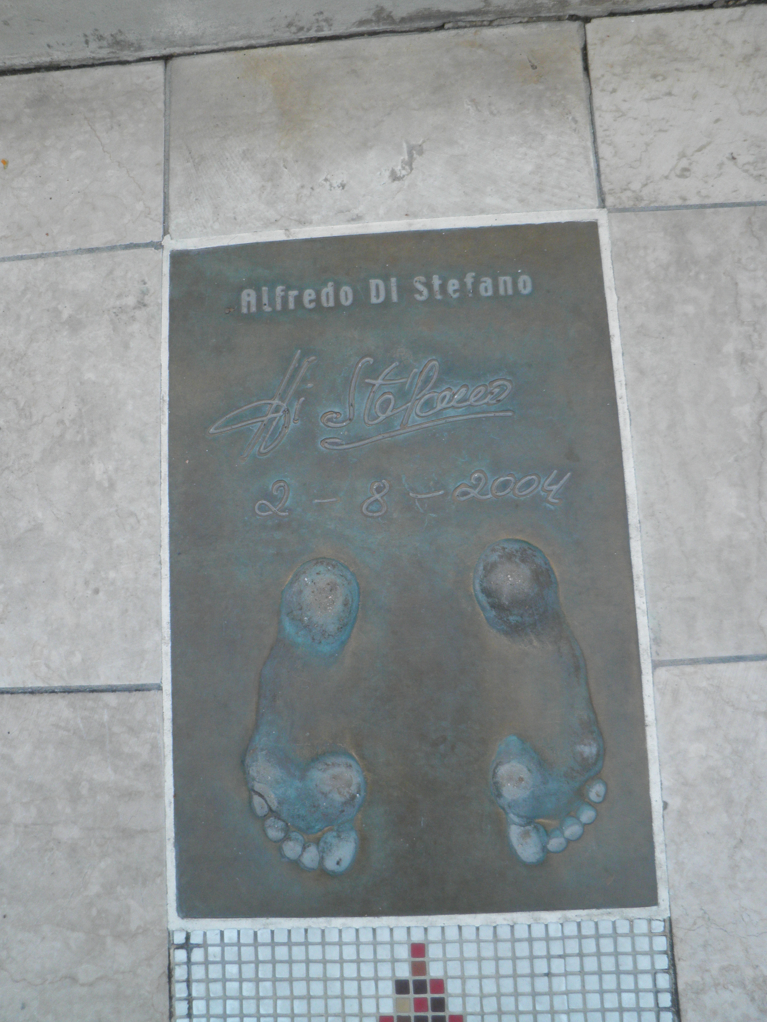 Alfredo di Stefano